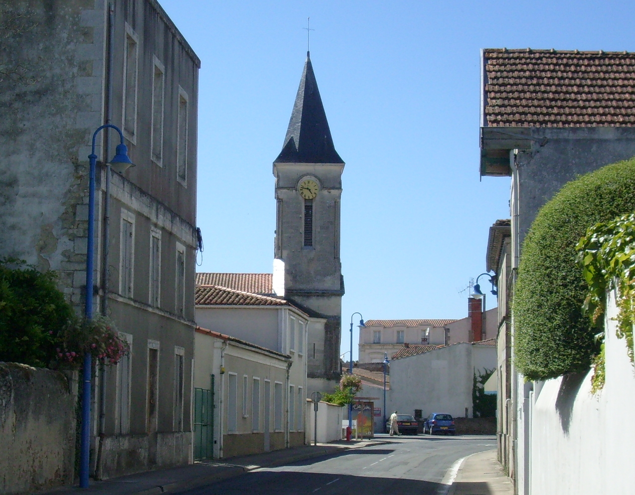 Le centre-ville d'Etaules (Charente-Maritime)